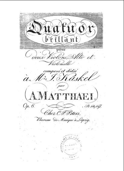 Titelblatt zum Streichquartett op. 6 von Heinrich August Matthäi